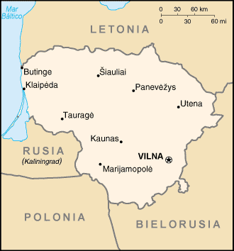 Fuente original: CIA World Factbook . Mapa de Lituania, traducido por Wesisnay